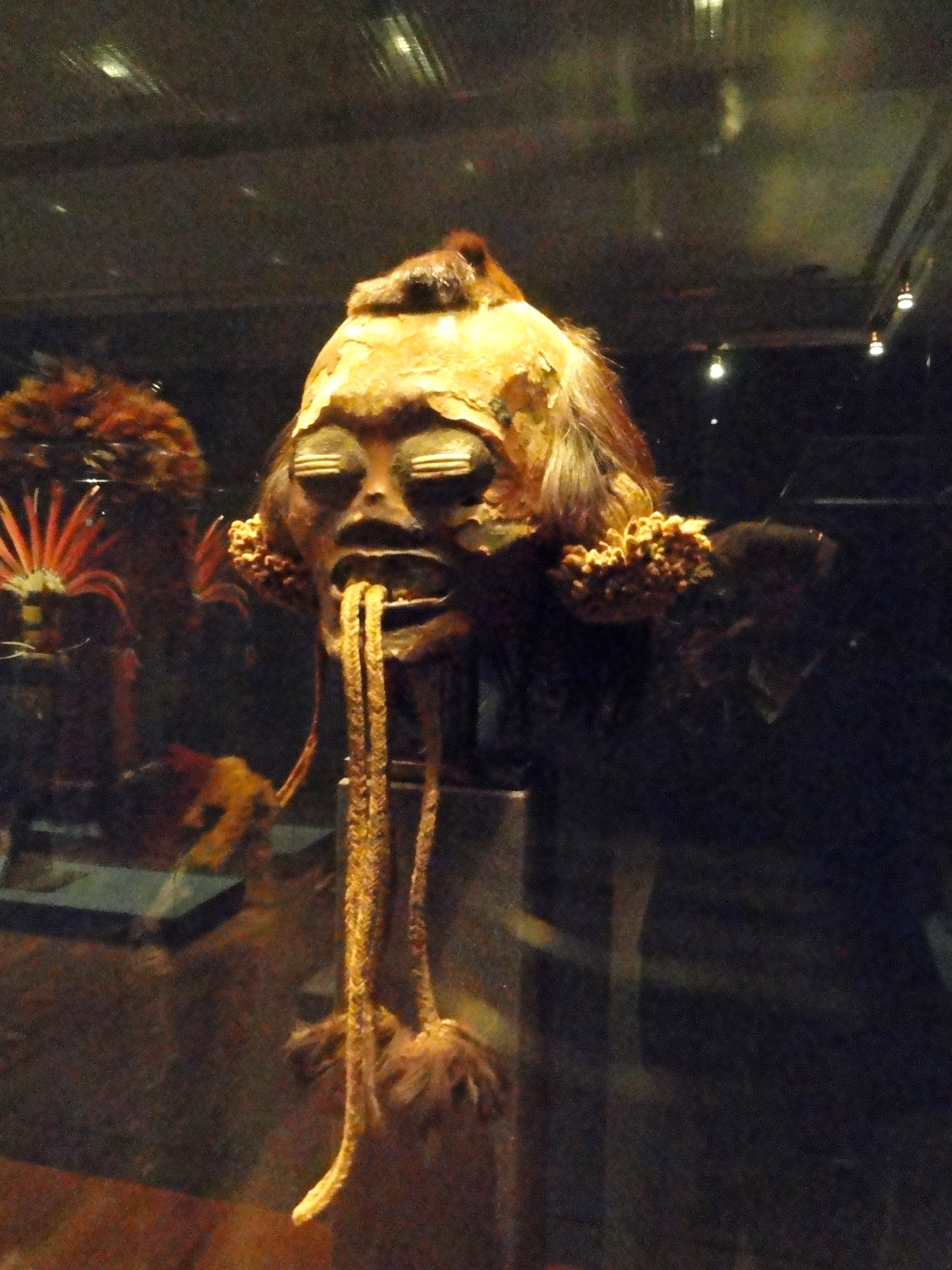 Exhibit from the 'Kunst der Welt' gallery of the Staatliches Museum für Völkerkunde München, Maximilianstraße 42, Munich, Germany. Head trophy, Munduruku people, northern Brazil, c 1820.